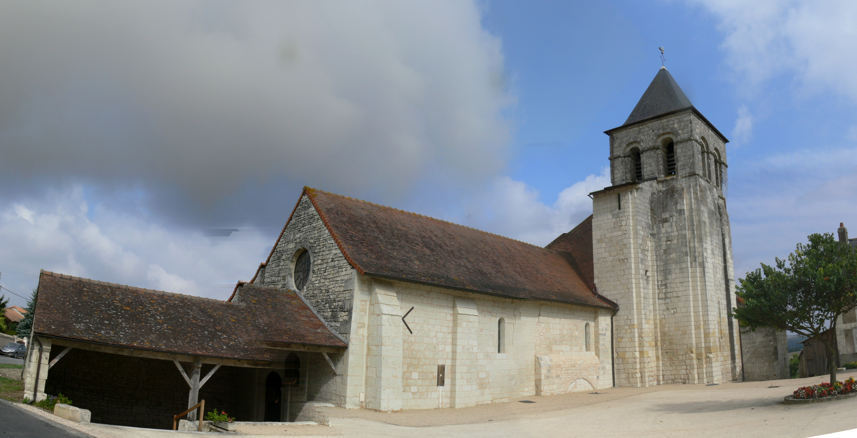 Église Sainte-Madeleine de Prinçay